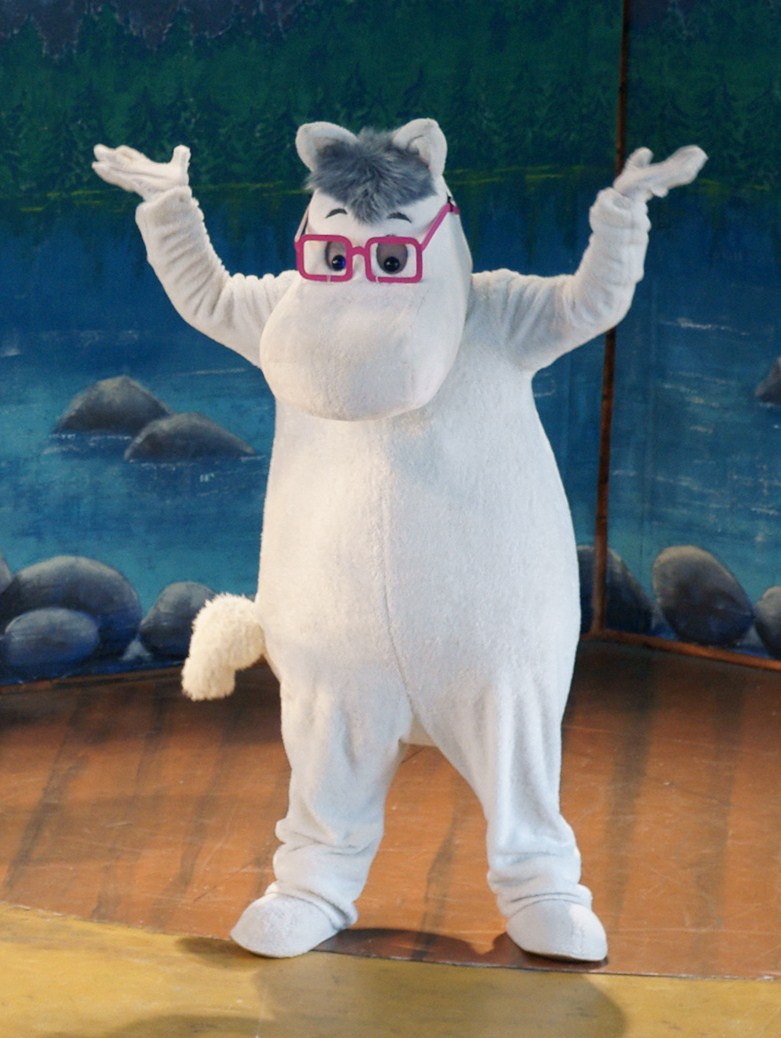 Migotek z Muminków.